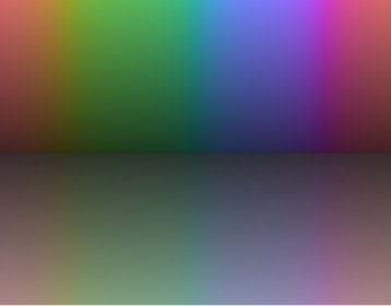 Eigen productie, GFDL. Een kleurenstaal met verschillende intensiteiten en tinten in 2 niveaus van verzadiging: 20% en 50%.